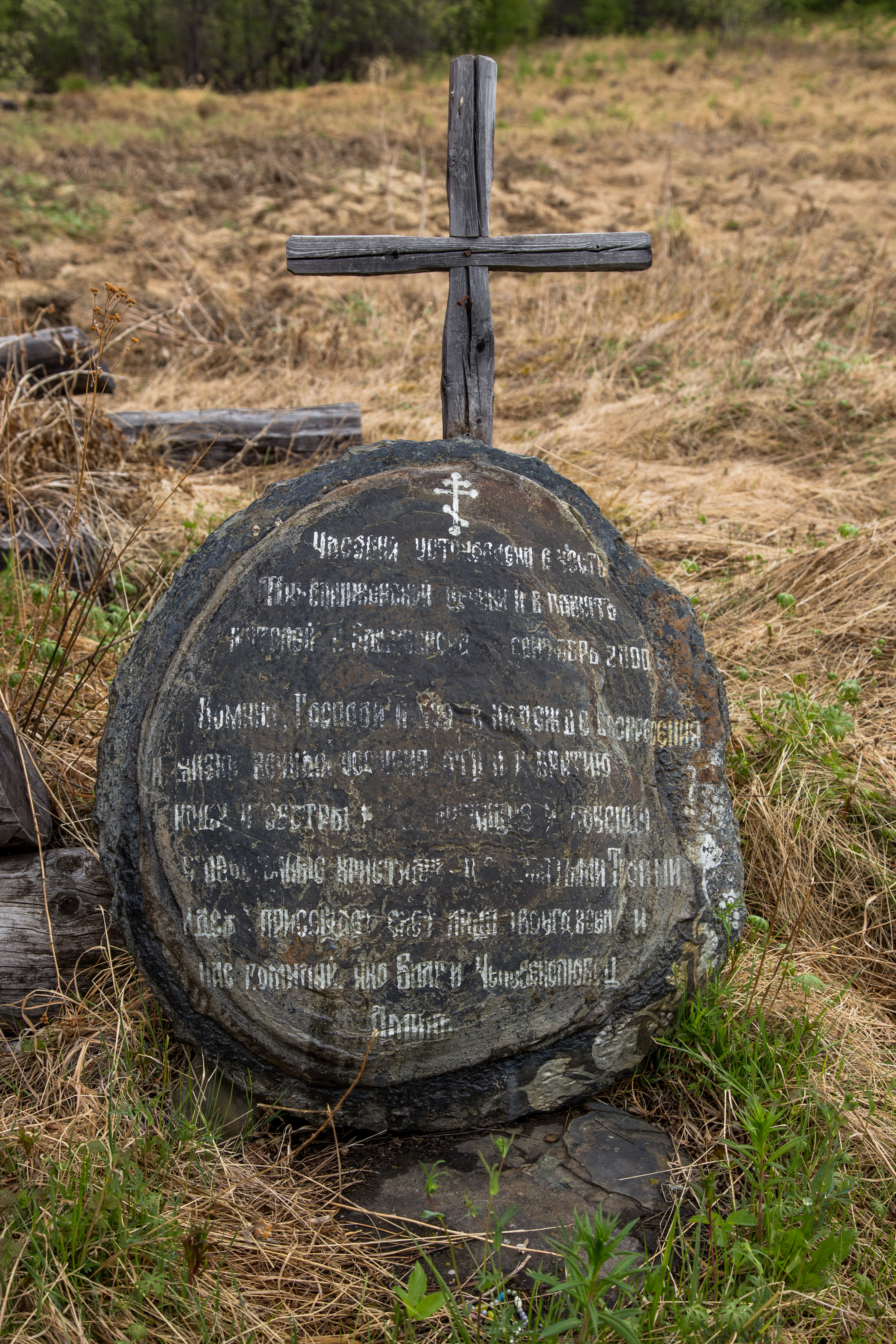 Зашиверск: Абыйский район, Якутия (Саха) This image is related to the protected area of Russia number 1420010